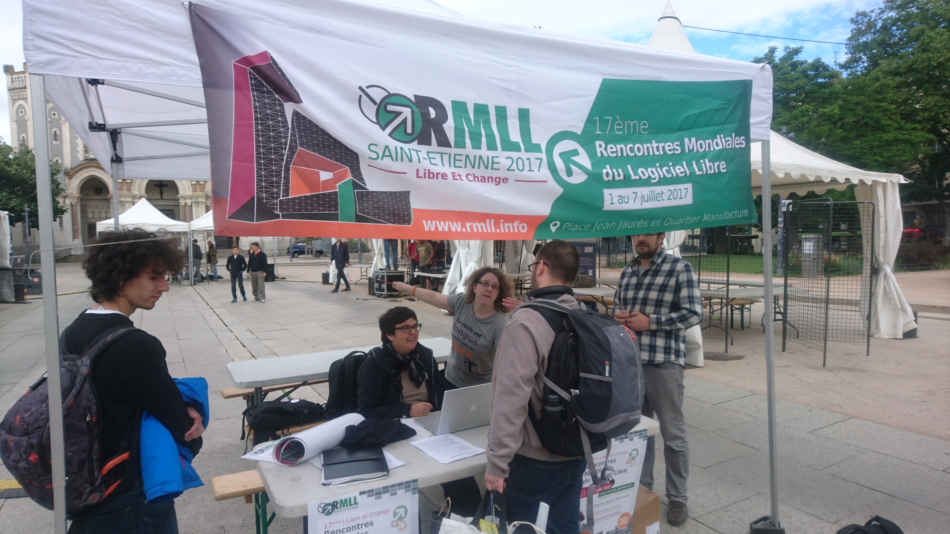 Village des rencontres mondiales du logiciel libre 2017 Place Jean-Jaurès à Saint-Étienne en France.